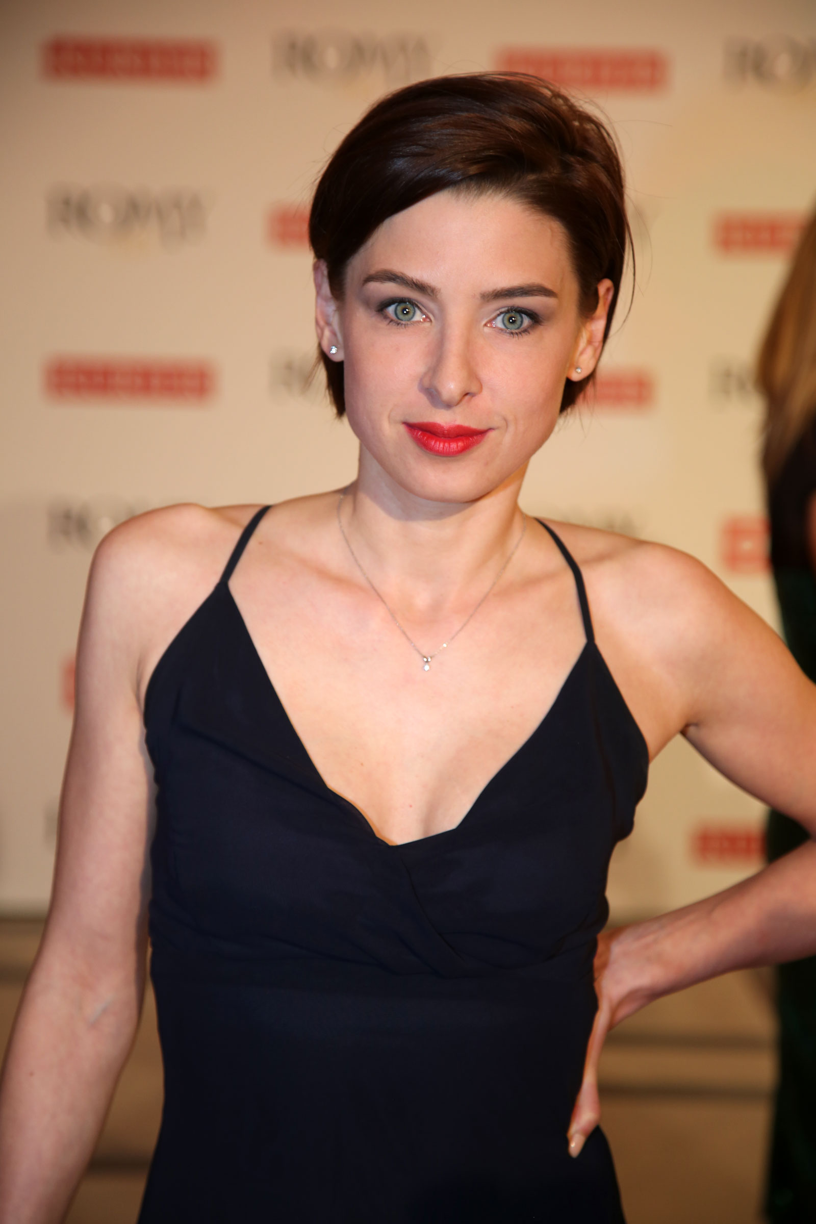 Martina Ebm at Romy 2015